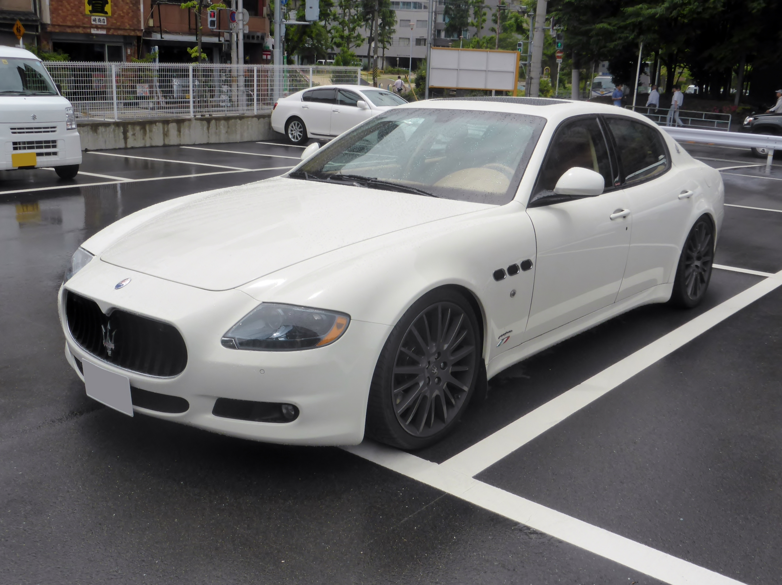 5代目マセラティ・クアトロポルテGTSをフロントから撮影。